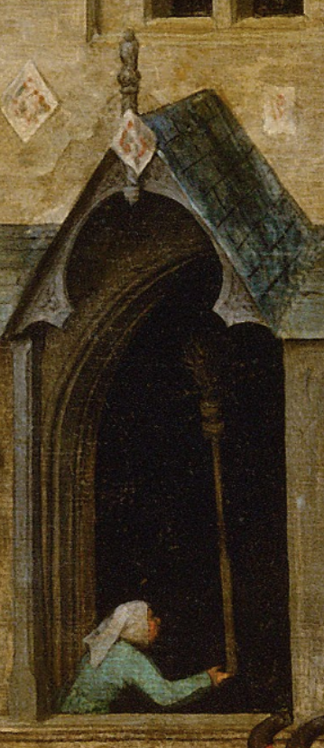 ילד משחק בשיווי משקל פרט מהציור משחקי ילדים של פיטר ברויגל האב , 1560